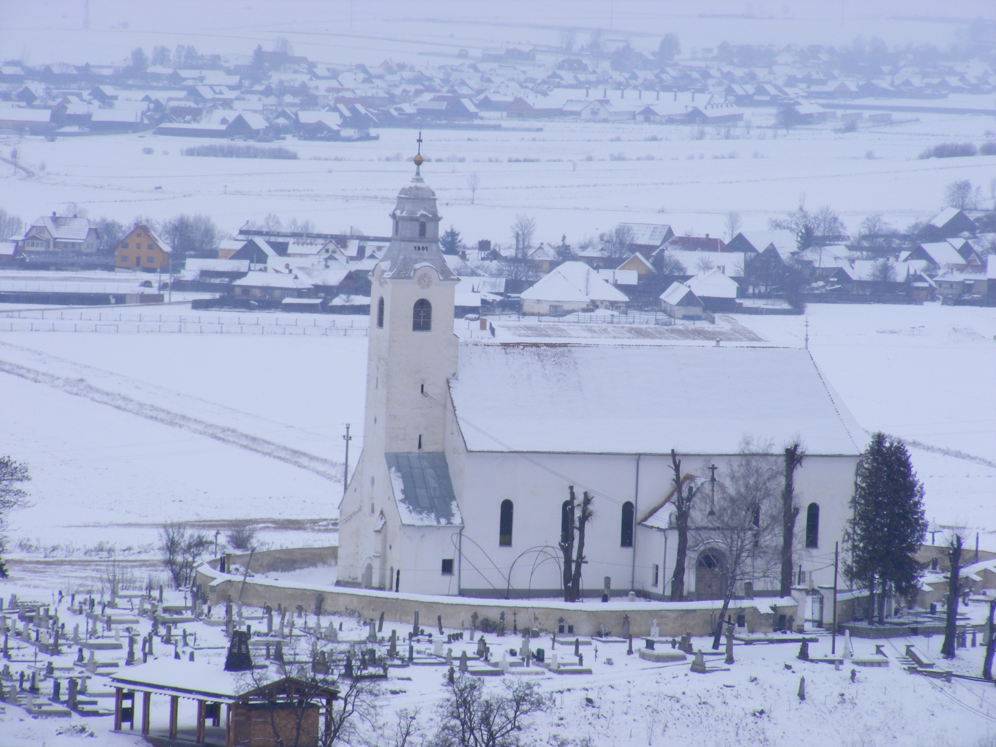 Csobotfalvi templom (Csíkszereda, Hargita megye, Erdély)